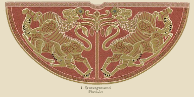 Zustammenstellung der wichtigsten Insignien der Reichskleinodien des Heiligen Römischen Reiches, aus Meyers Konversationslexikon. Legende: #Deutsche Königskrone (Hier hat sich Meyers Konversationslexikon geirrt. Es handelt sich um die Kaiserkrone der Aachener Karlsbüste) #Kaiserkrone]mantel (Pluviale) #Königszepter #Kaiserzepter#Krönungshandschuh #Krönungsschuh #Krönungsschuh